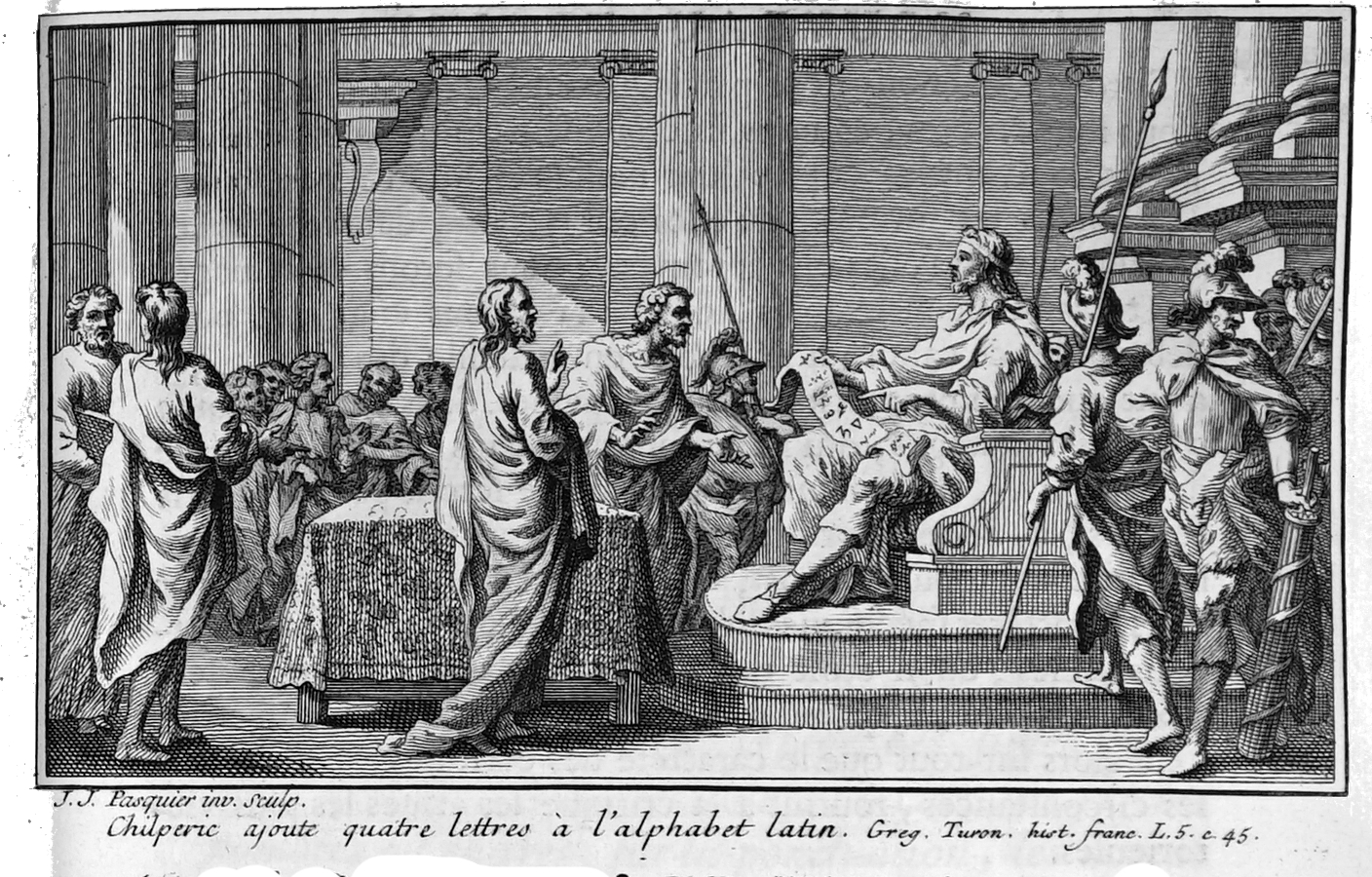 publié dans "Nouveau traité Diplomatique..." TII.